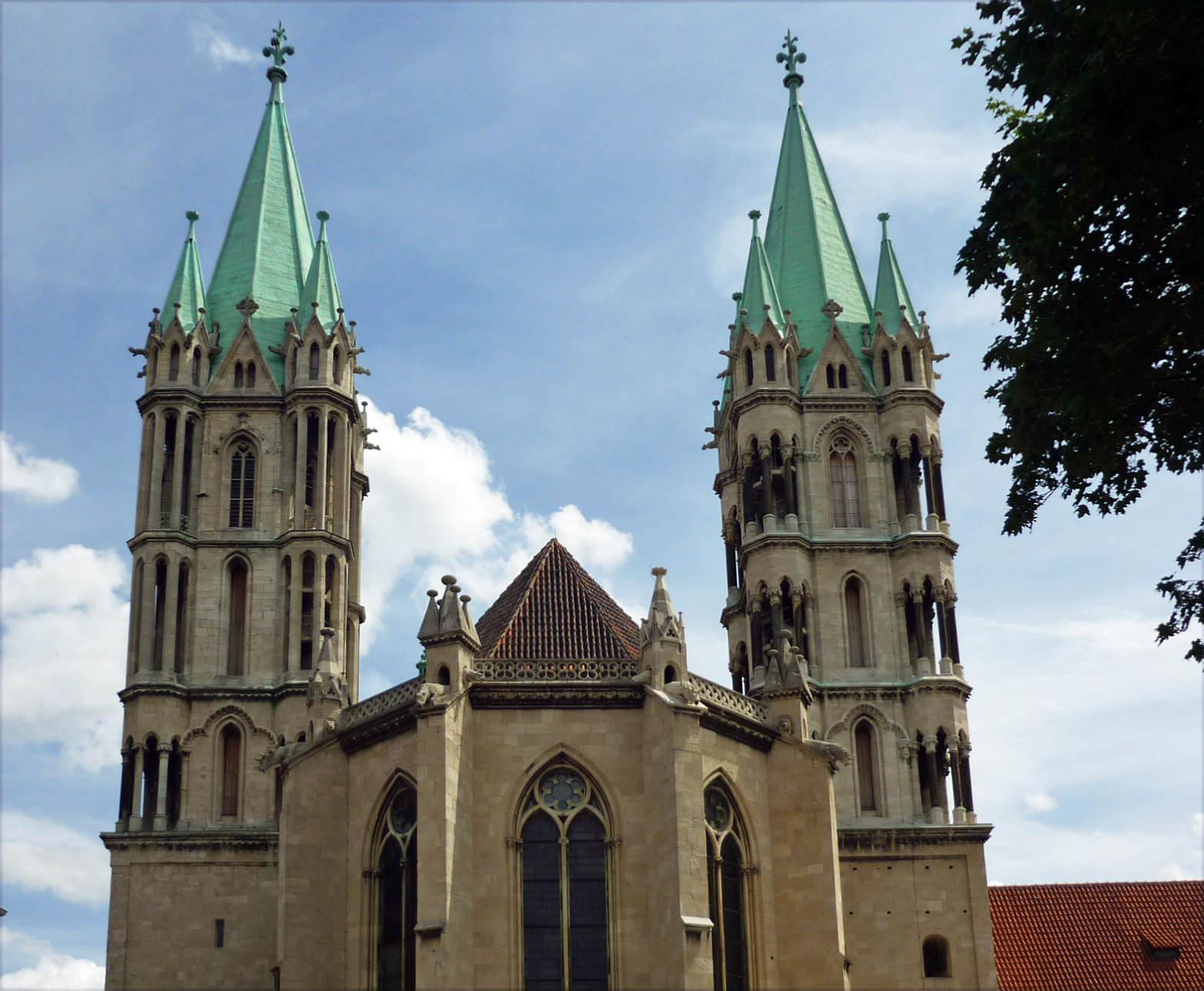 Türme des Doms zu Naumburg an der Saale